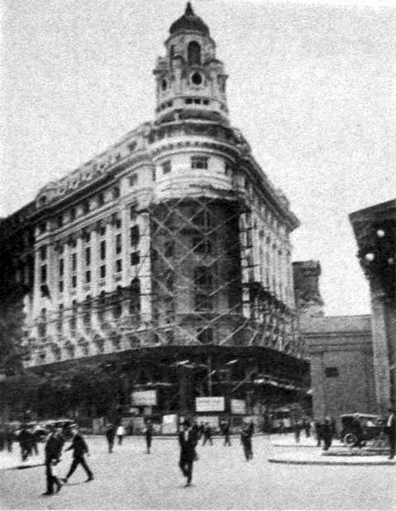 Edificio en construcción destinado a sede en Buenos Aires del Banco Argentino Uruguayo. Esquina de la Diagonal Norte y San Martín, frente a la Plaza de Mayo. Actual Jefatura de Gabinete de Ministros.